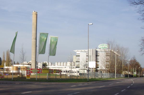 Campina-Firmensitz in Heilbronn